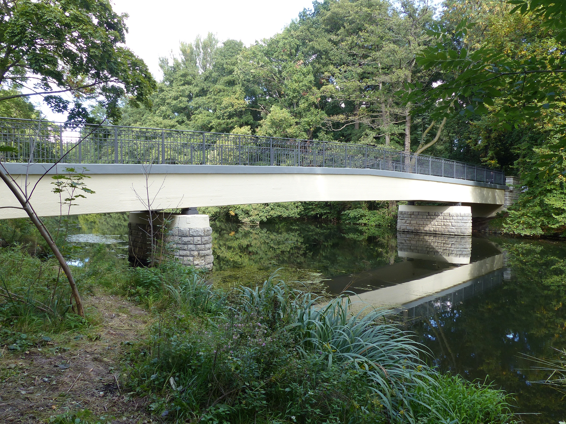 Okerbrücke Richmondweg, Ansicht von Norden 2015.